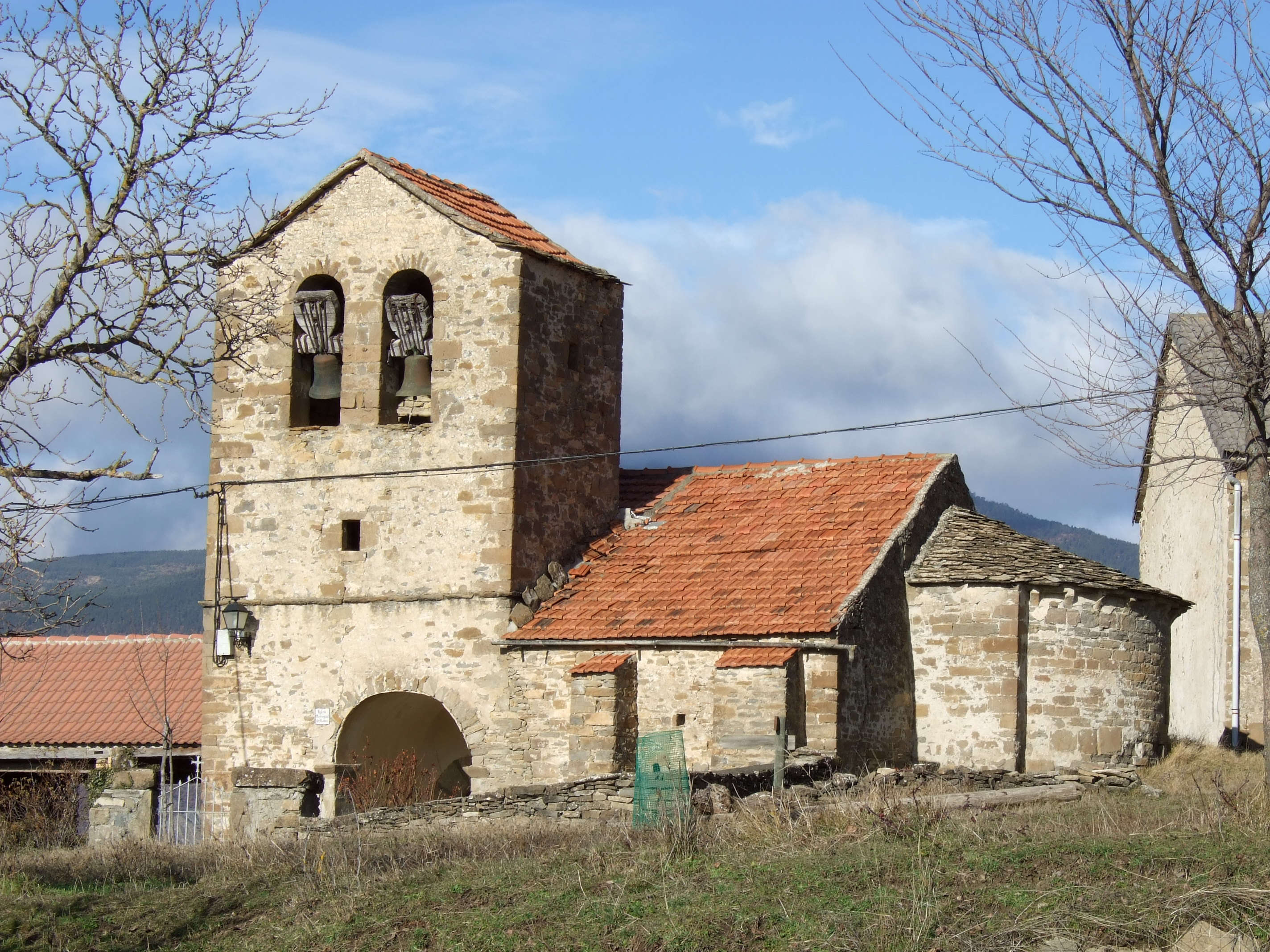 Latas - Iglesia de San Martín